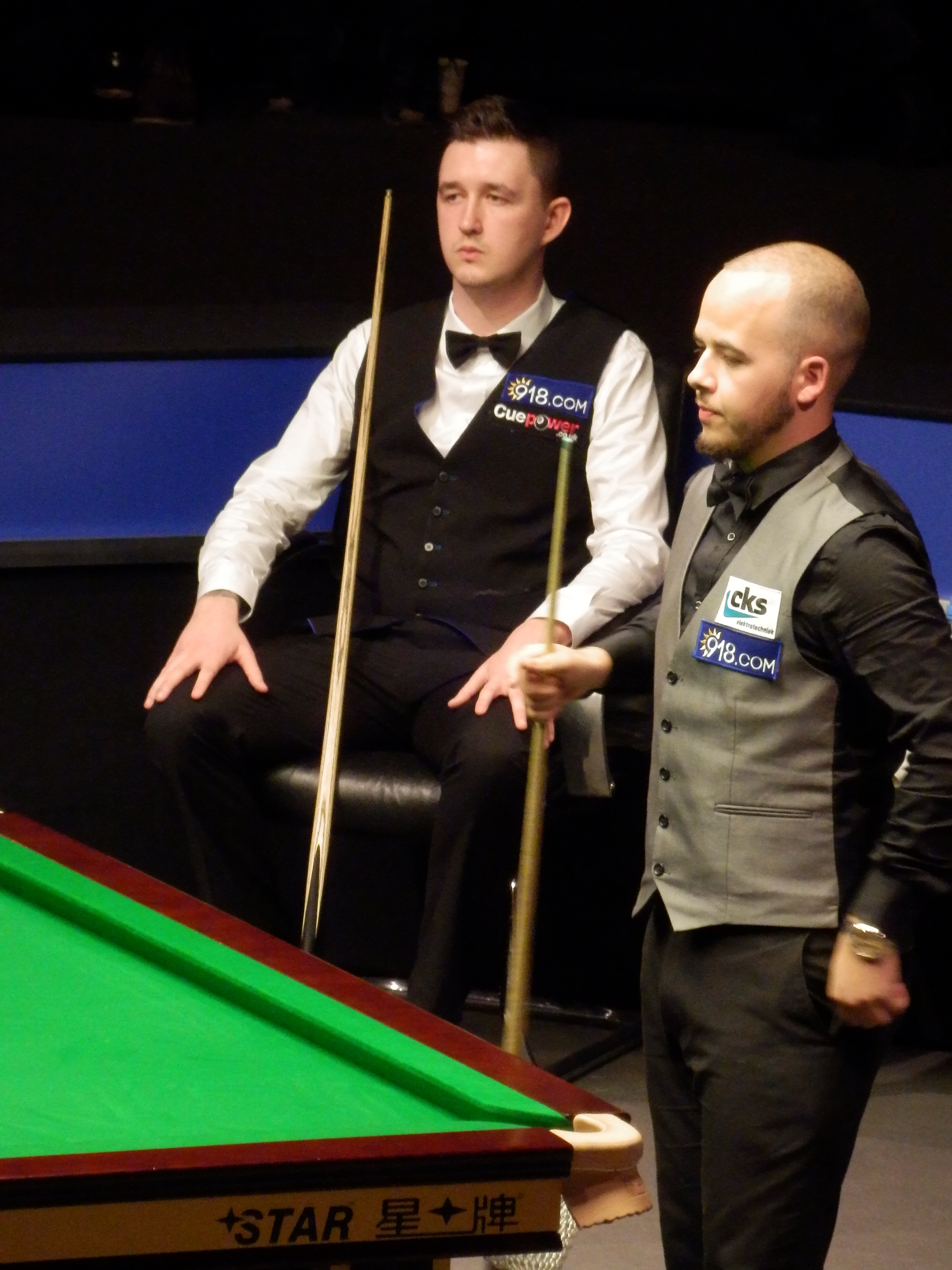 Kyren Wilson und Luca Brecel im Halbfinale des German Masters 2016.